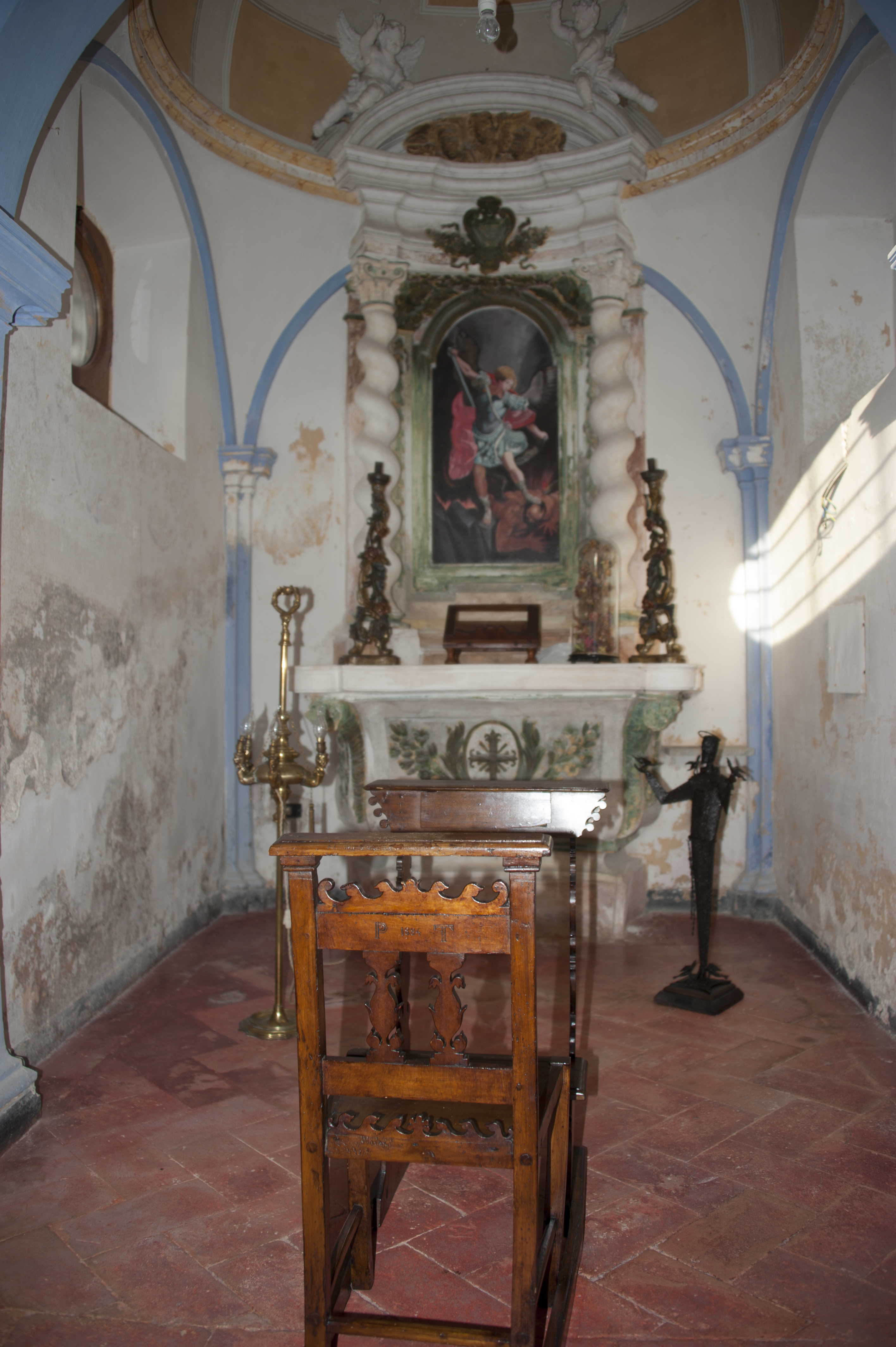 L’eremo di San Michele Arcangelo conserva tre profonde grotte, una delle quali fu in epoca remota adattata ad oratorio, e una cappella, è l’unico romitorio femminile del Monteluco.